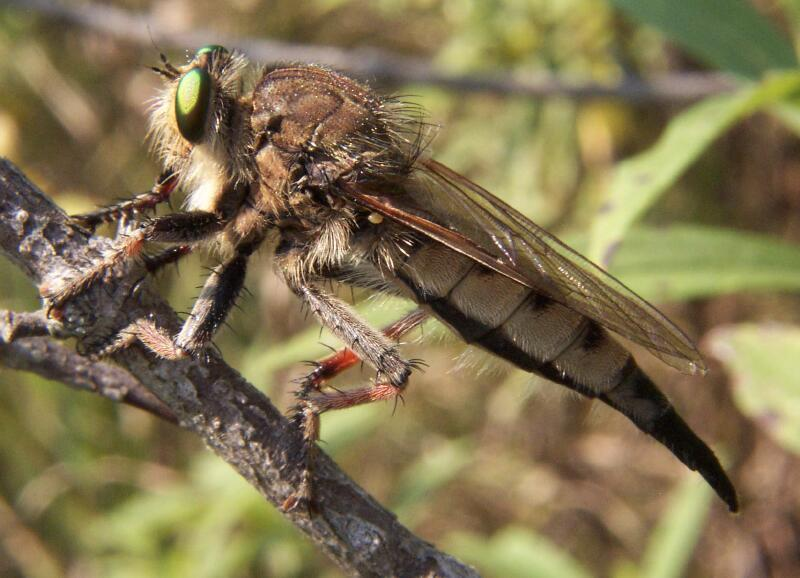 Adult female robber fly, Promachus vertebratus, Winfield IL USA, det. Fritz Geller-Grimm